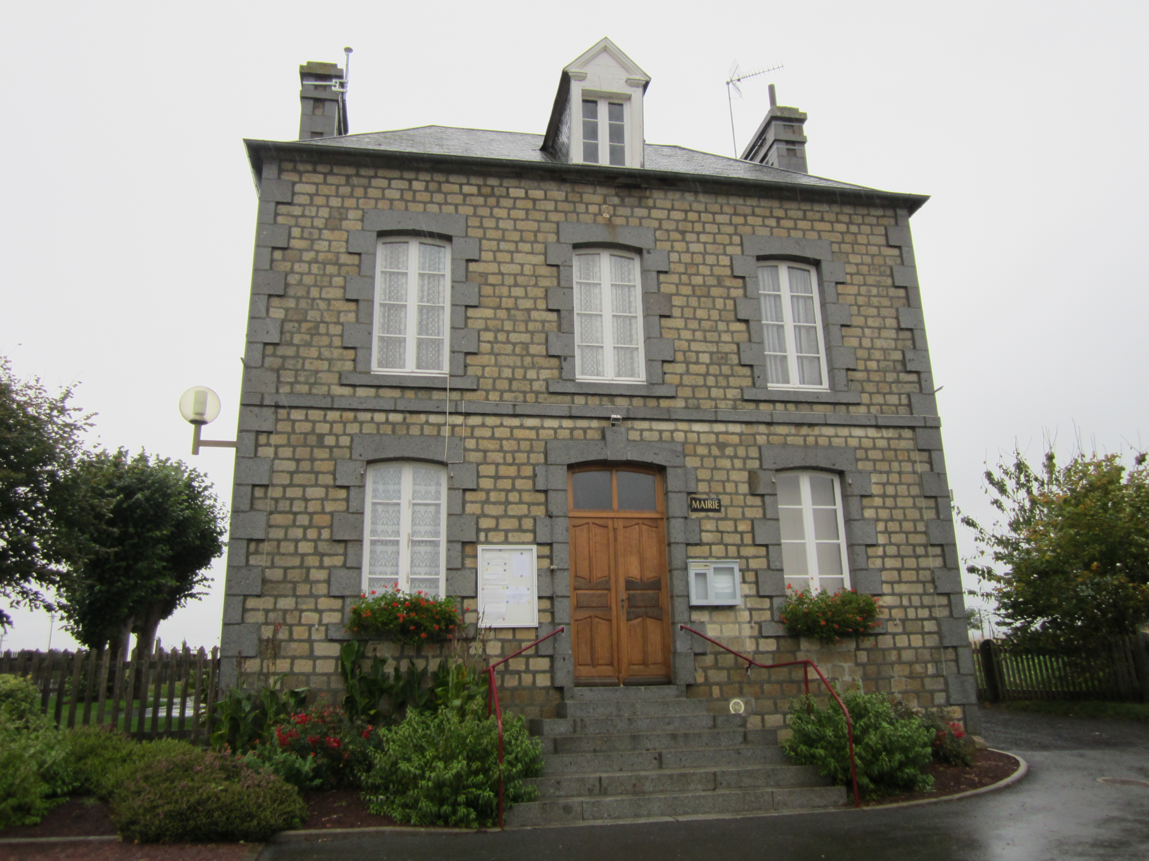 Le Mesnil-Tôve, Manche